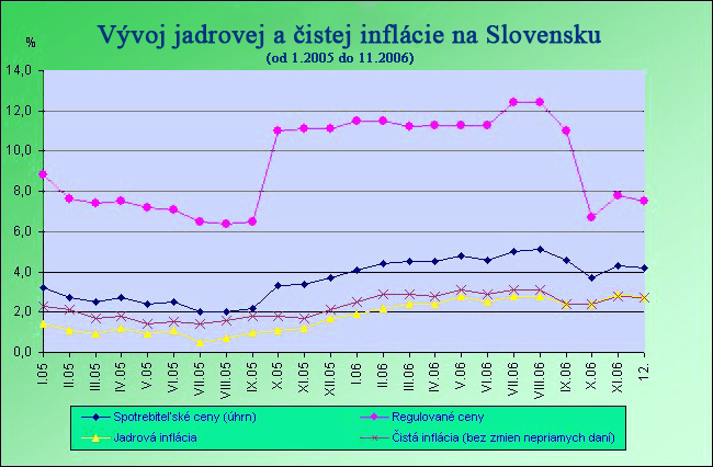 Jadrova inflacia na slovensku (core inflation SVK)